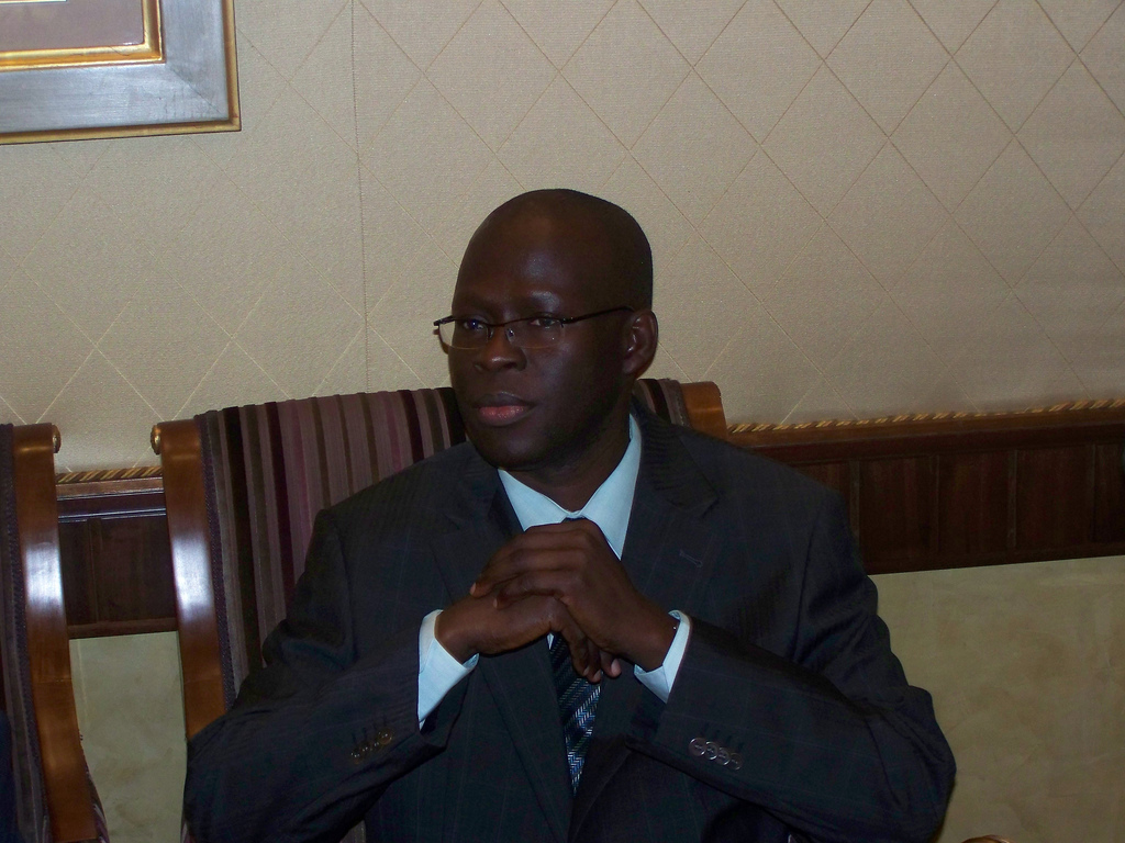 Cheikh Bamba Dièye - Assises nationales du Sénégal à Dakar